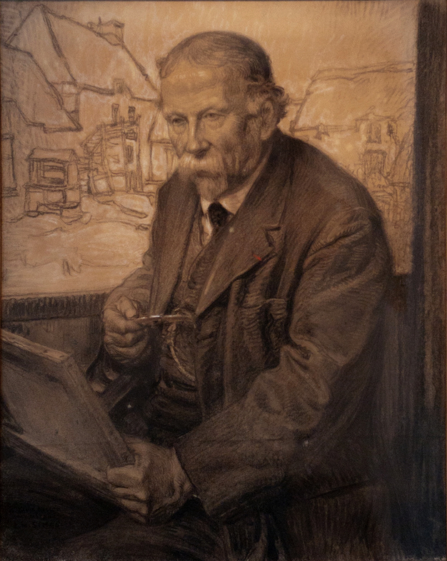 Eugène Martial Simas (1862-1939) : Portrait de Germain David-Nillet (1929, fusain, Musée du Faouët)